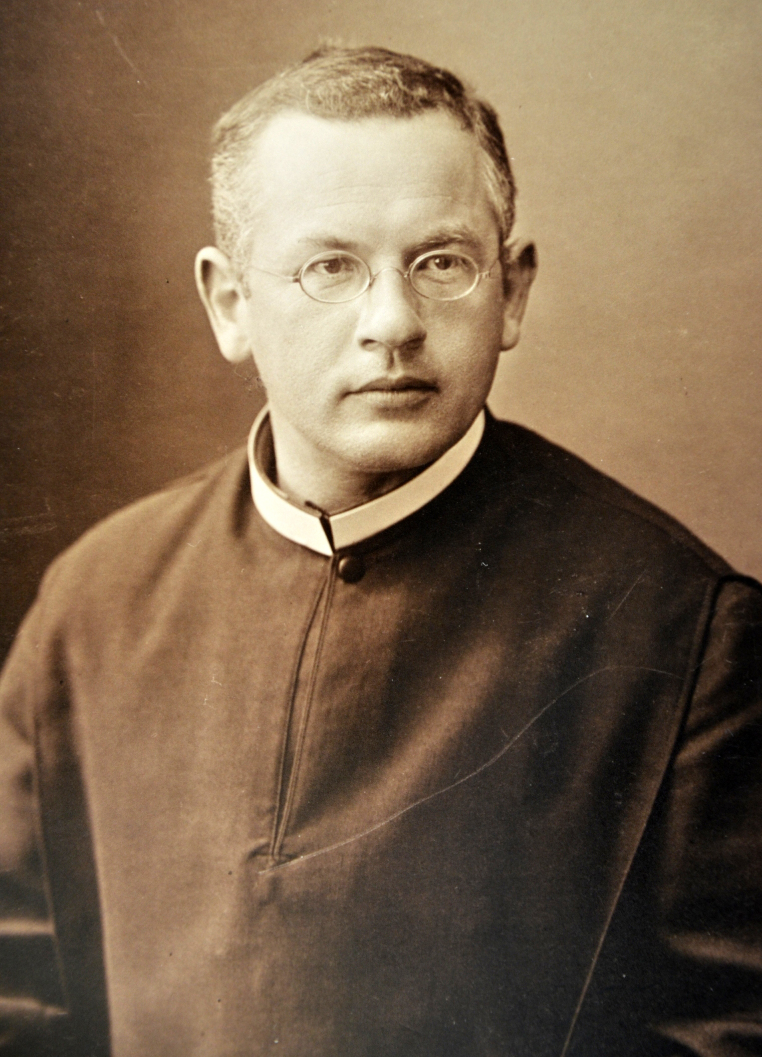 Pater Joseph Peruschitz 5. Mit freundlicher Erlaubnis des Klosters Scheyern, ©fm